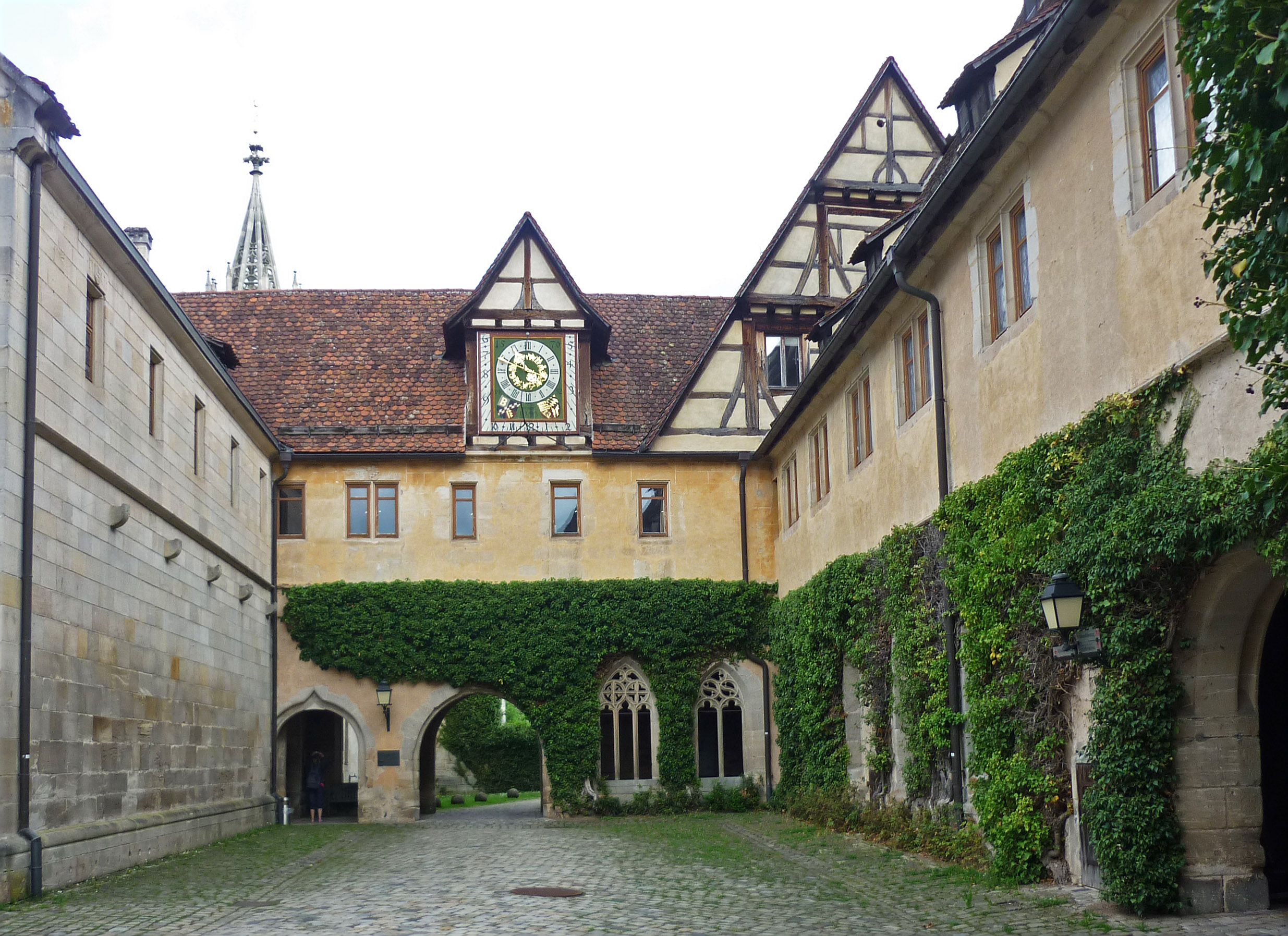 Verbindungsbau im ehem. Zisterzienserkloster Bebenhausen (OT von Tübingen in Württemberg)